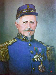 Brigadeiro Antônio de Sampaio